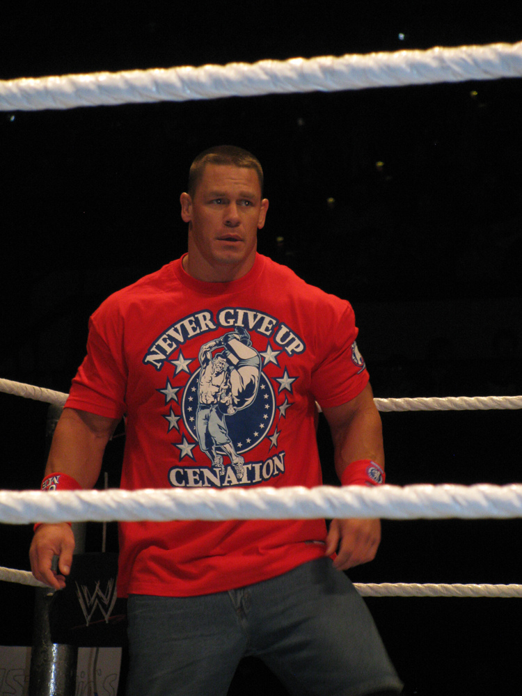 Cette photo a été prise le 3 juillet 2011 avec une Canon PowerShot SX110 IS. John Cena @ Adelaide, South Australia 'RAW' house show on the 4th of July '11